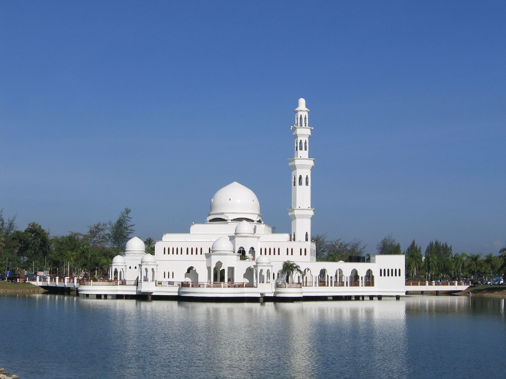 "Floating" mosque of Kuala Terengganu.